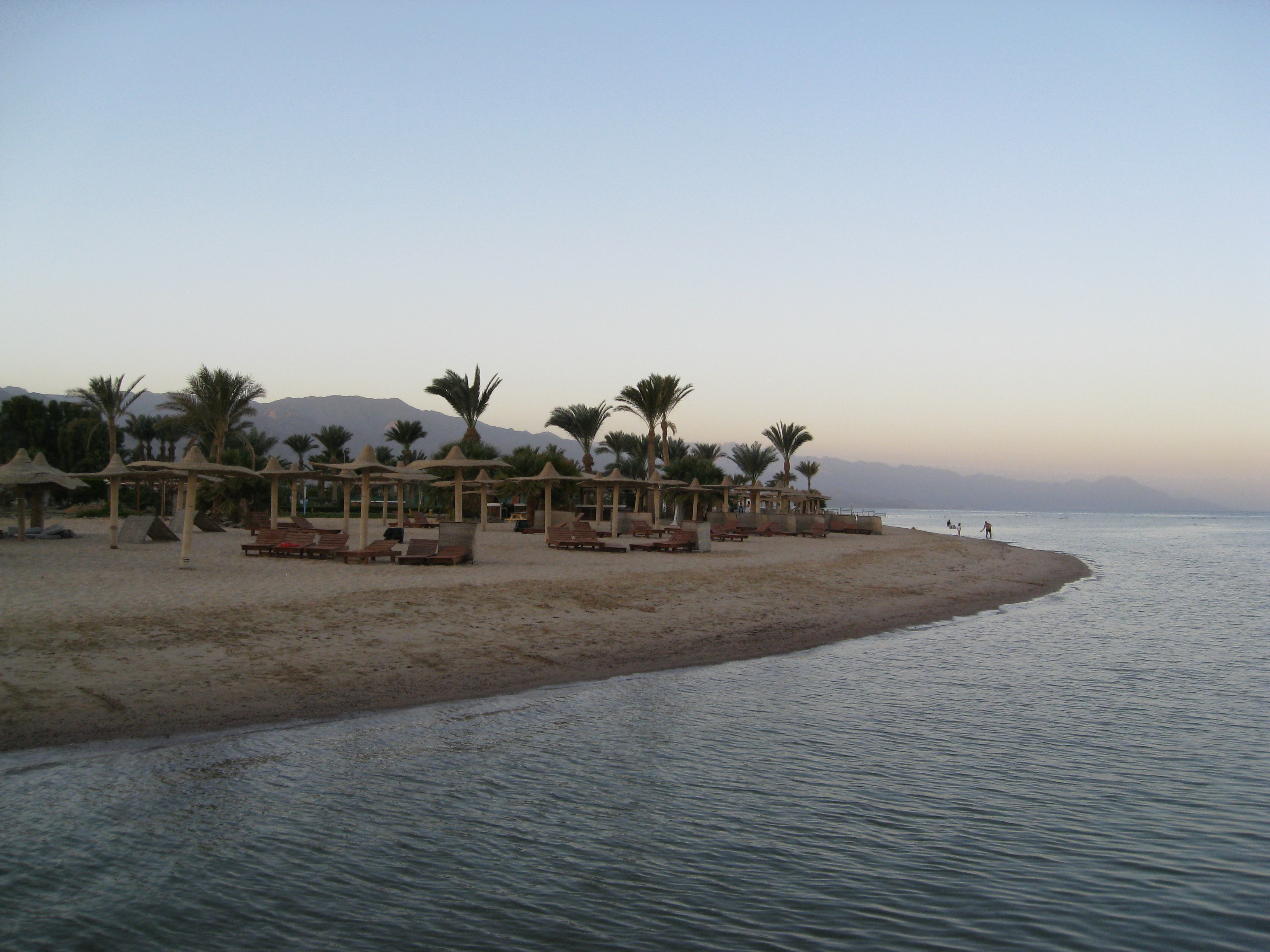 Nuweiba, Egypt